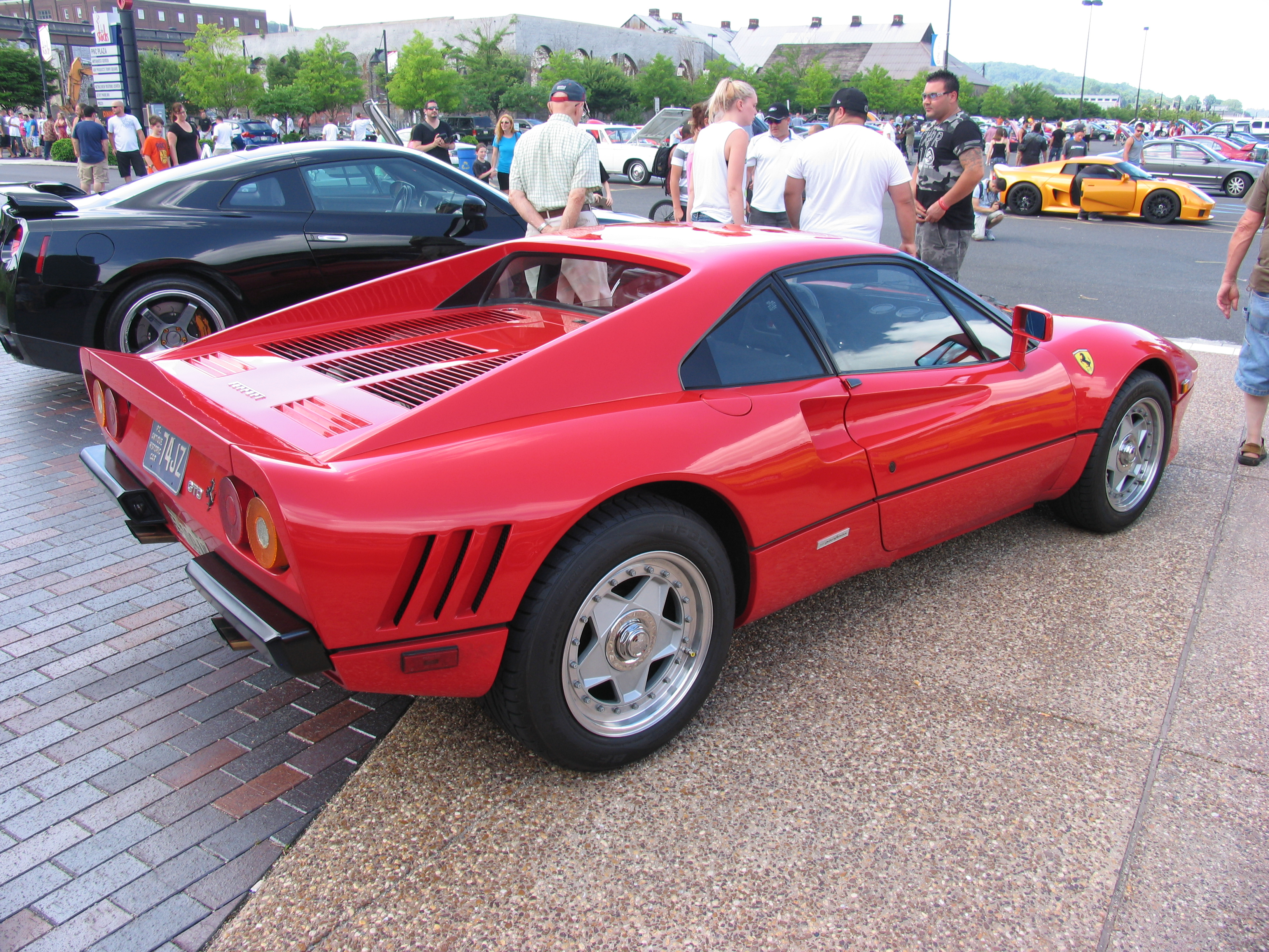 Ferrari 288 GTO